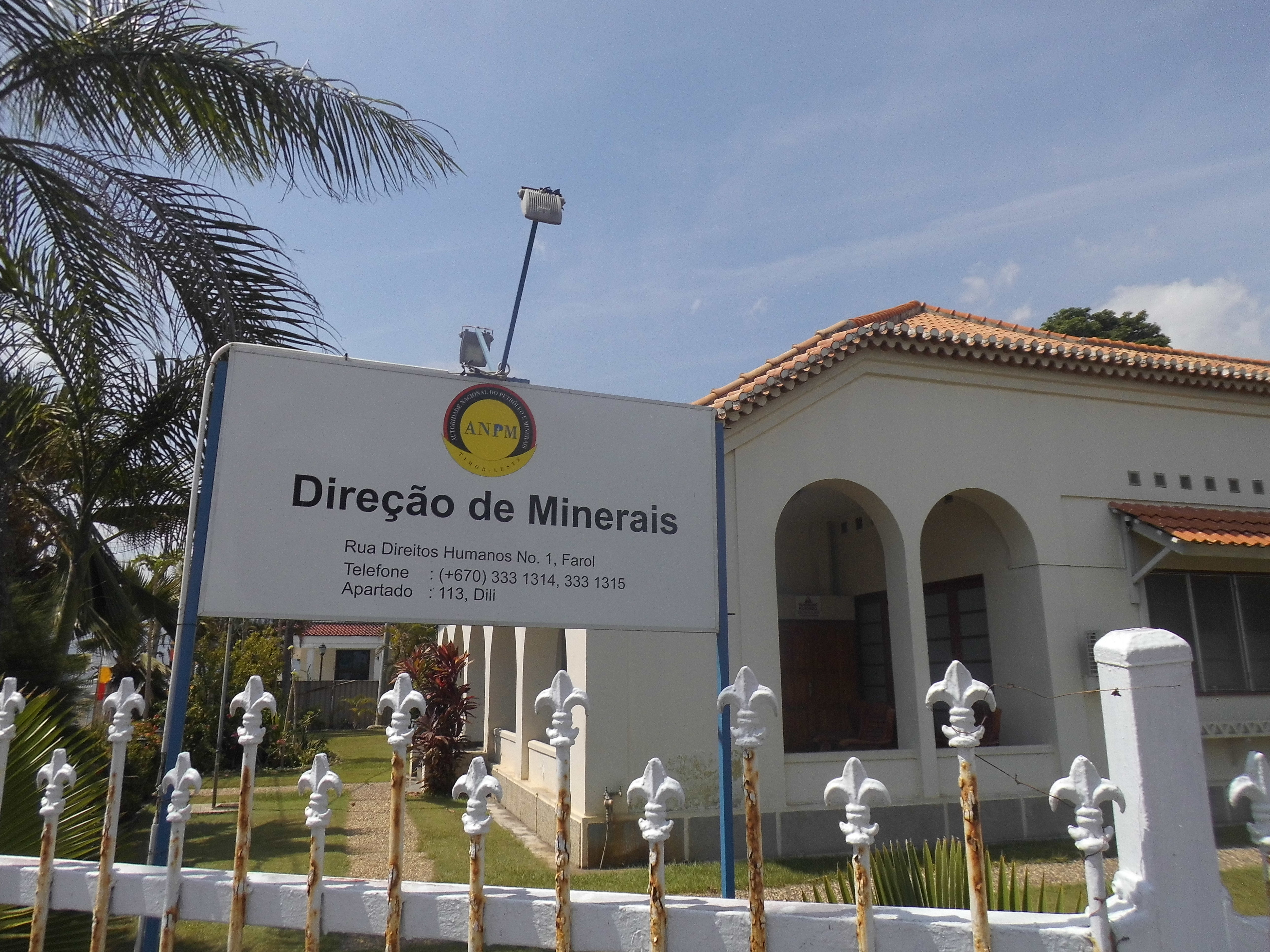 Direção de Minerais